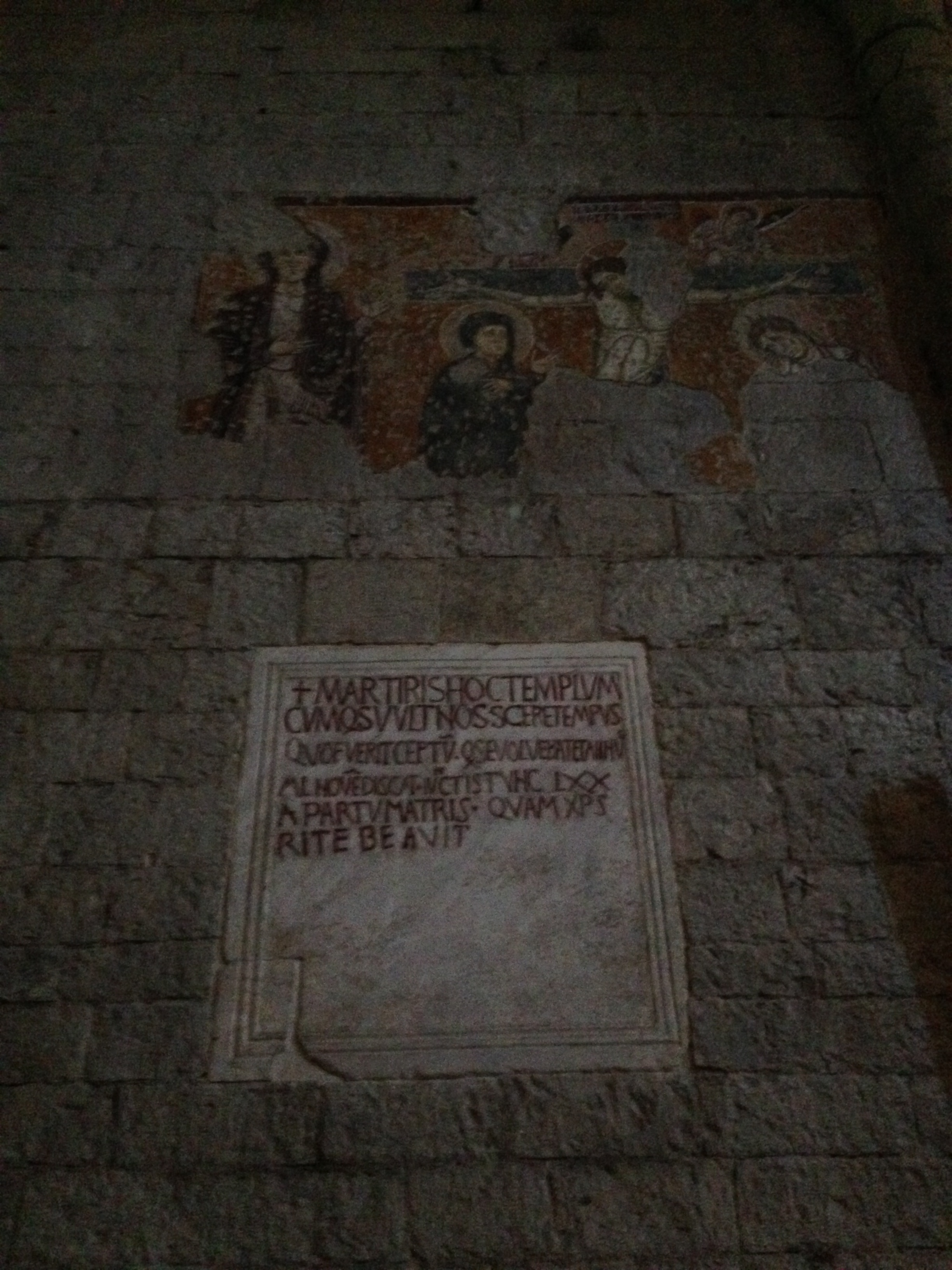 Spoleto. chiesa San Gregorio Maggiore. Scritta marmorea